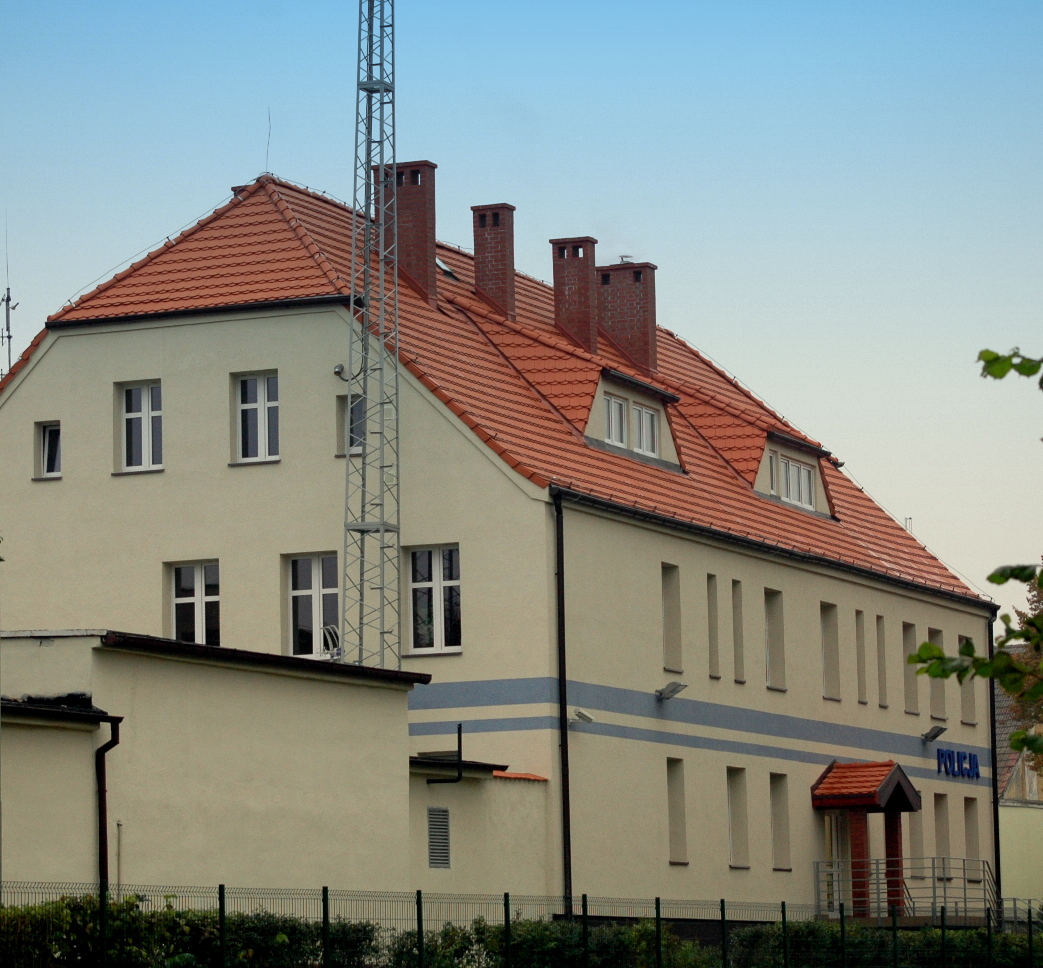 Komisariat policji w Nowogardzie.